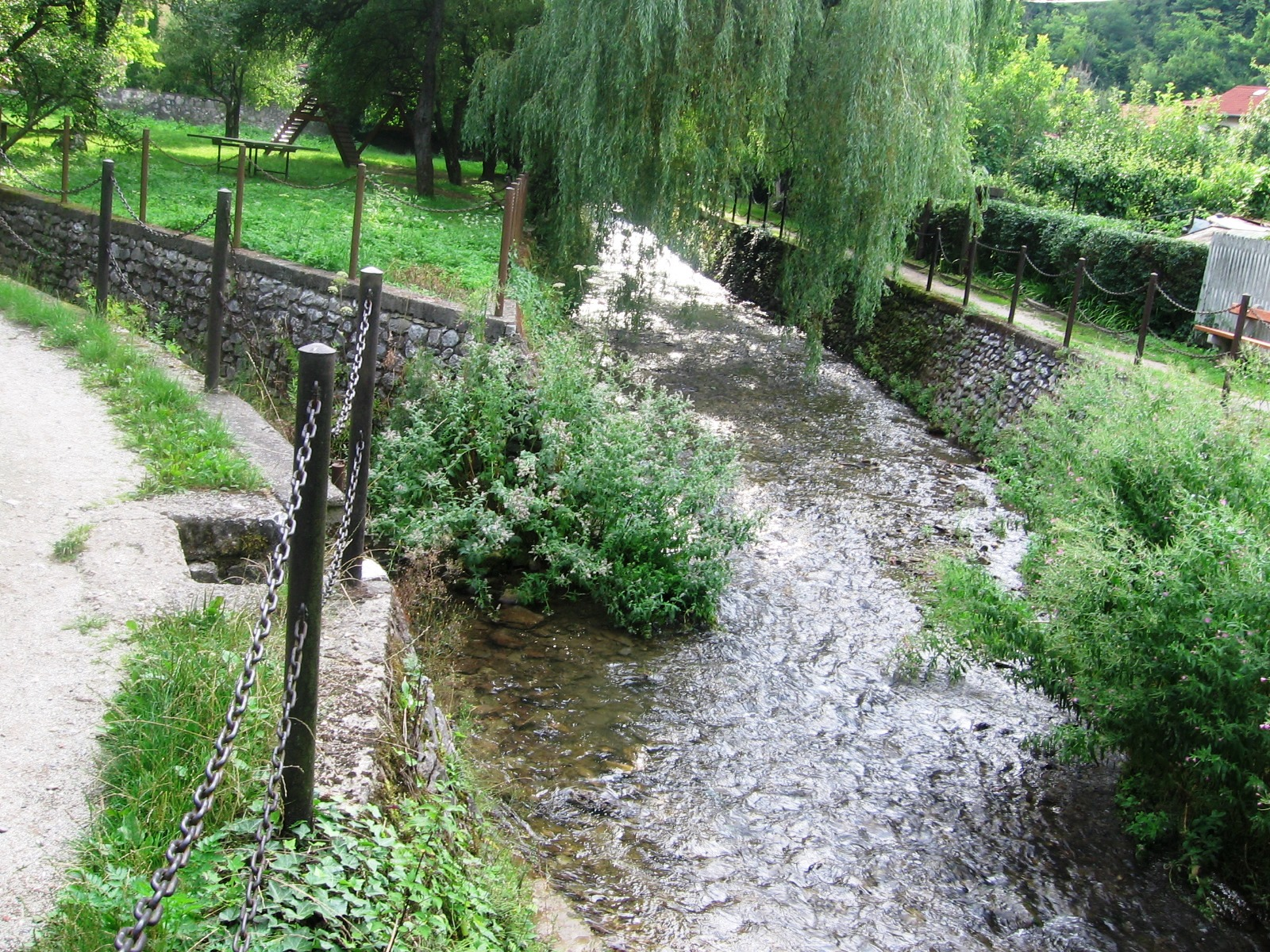 A Szinva (bal) és a Garadna (jobb) patakok itt folynak össze Felső-Hámorban, Lillafüred mellett.